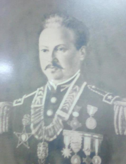 Fotografía del Comandante Luis Jorge Fontana, con su uniforme militar en 1878.